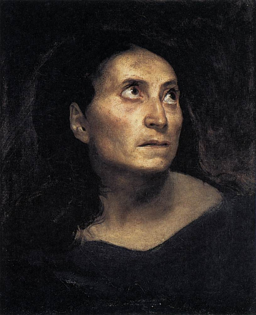 Tête de vieille femmeHead of an old womantitle QS:P1476,fr:"Tête de vieille femme" label QS:Lfr,"Tête de vieille femme" label QS:Len,"Head of an old woman"